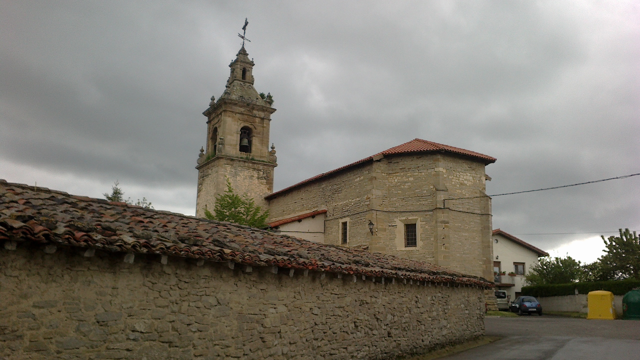 Uribarri Arratzuko eliza